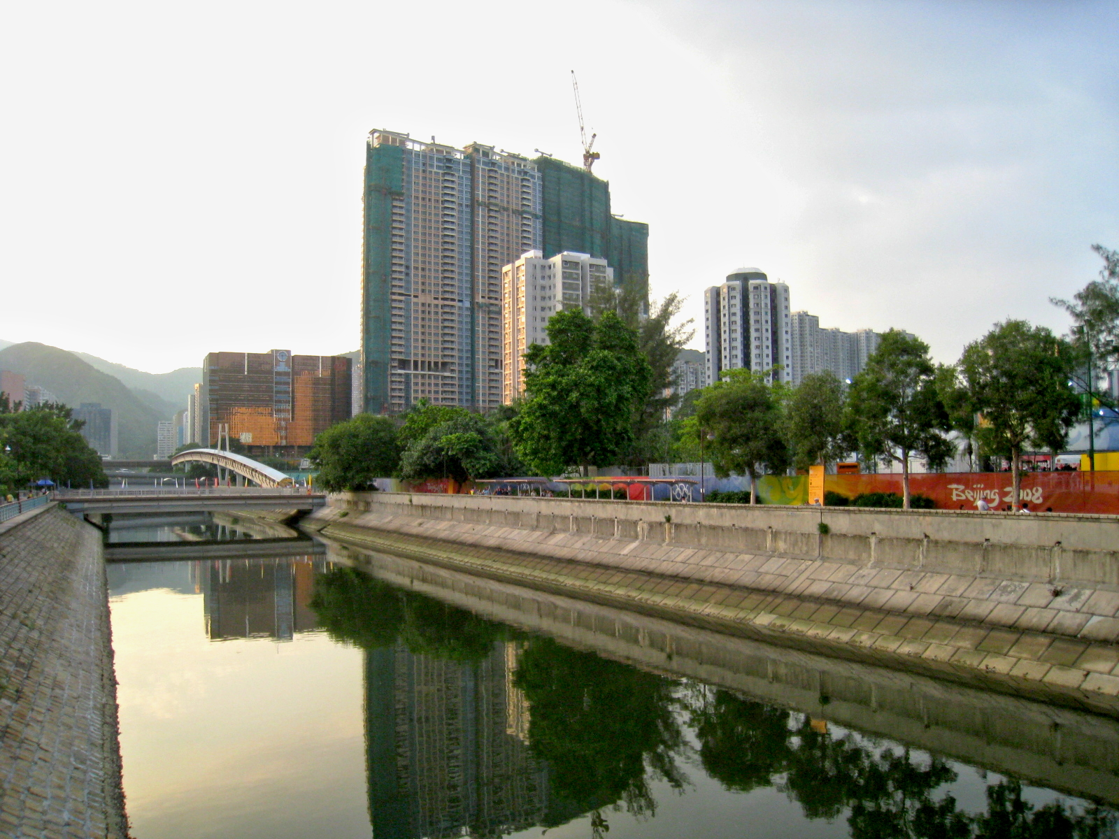 Fo Tan Nullah 火炭渠